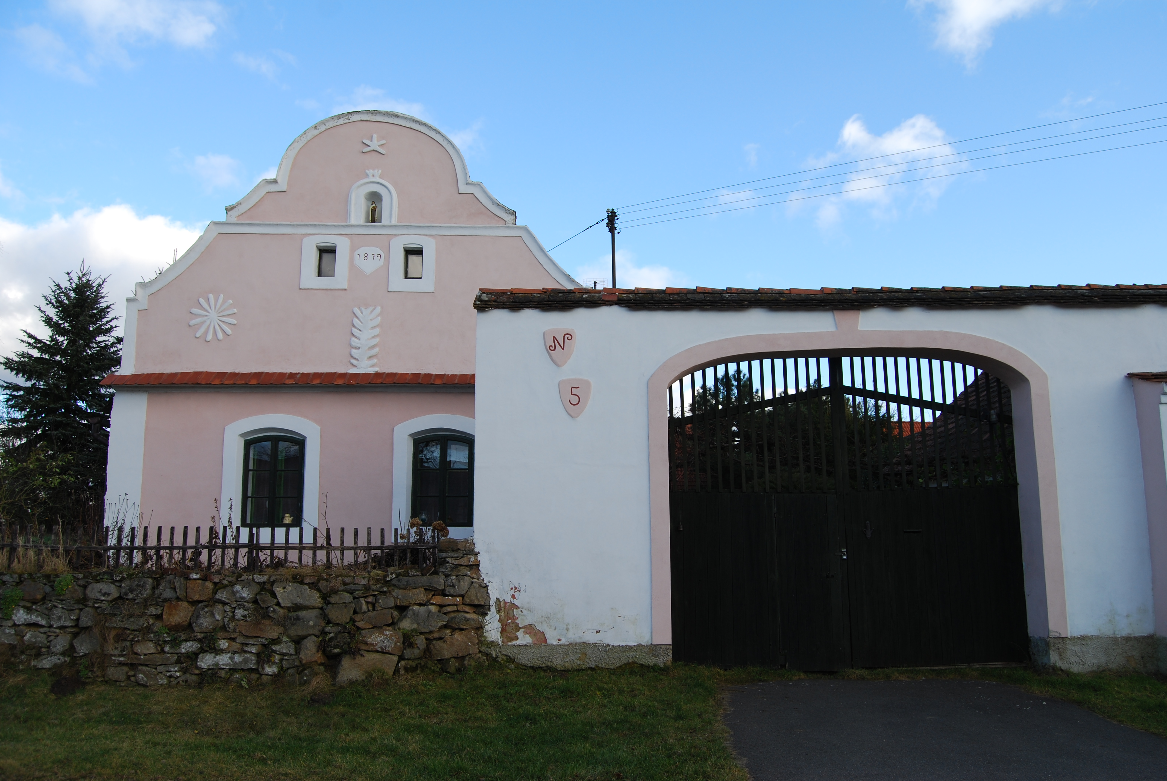 Usedlost čp. 5 z roku 1879. Kašina Hora (část obce Záhoří). Okres Písek. Česká republika.